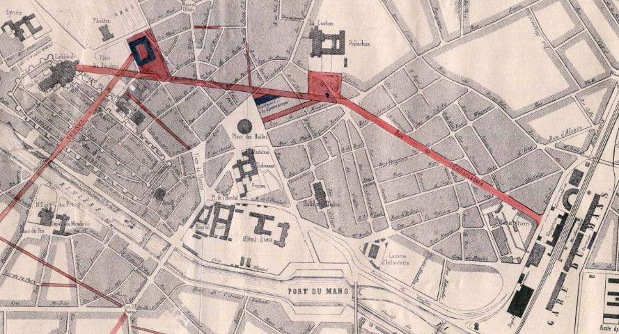 La vue du plan datant de 1878 permettant de relier la gare du Mans à la place des Jacobins.